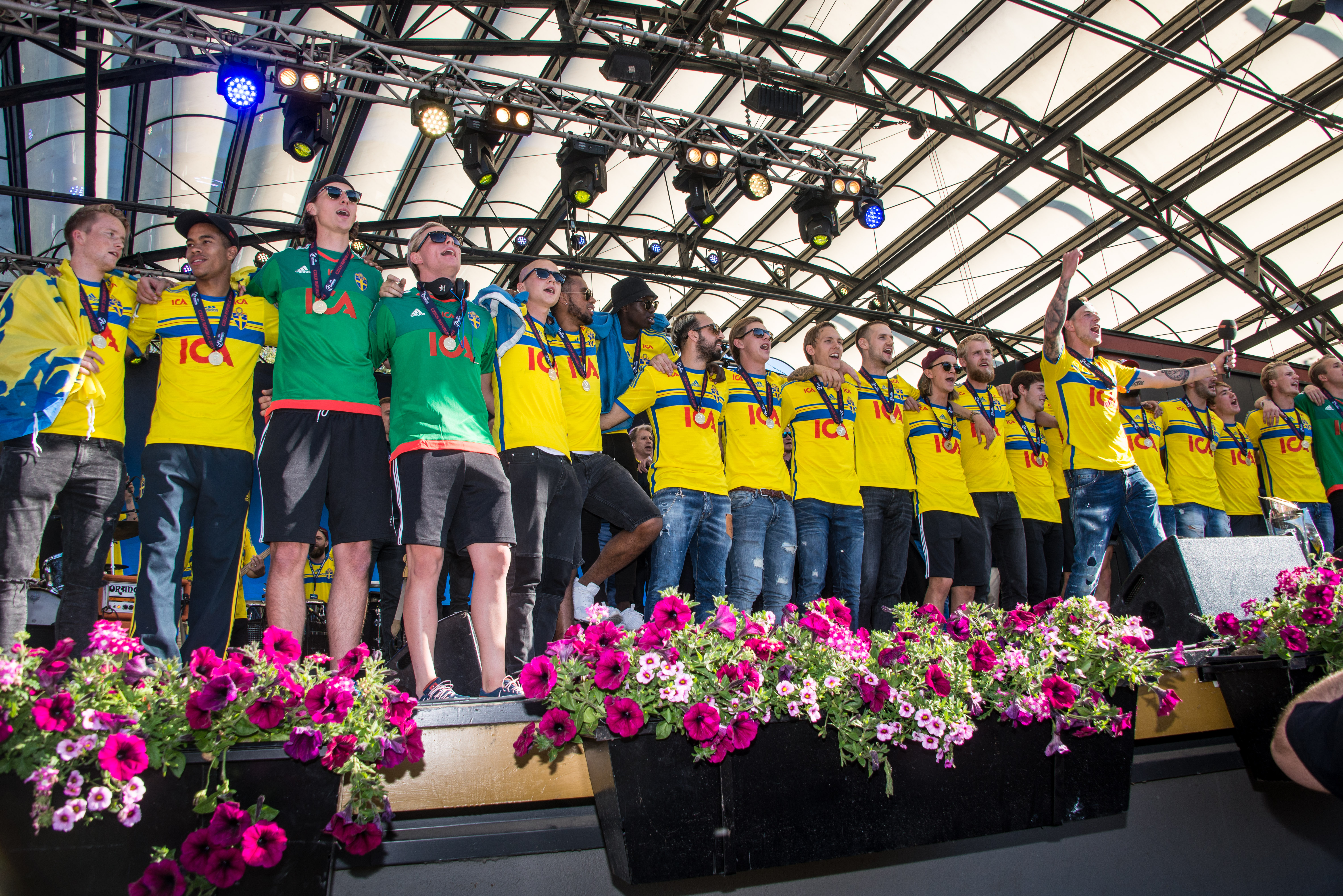 Sveriges U21-landslag blir firad i Kungsträdgården i Stockholm den 1 juli av 1000-tals fans efter guldet i U21-Europamästerskapet i fotboll 2015.